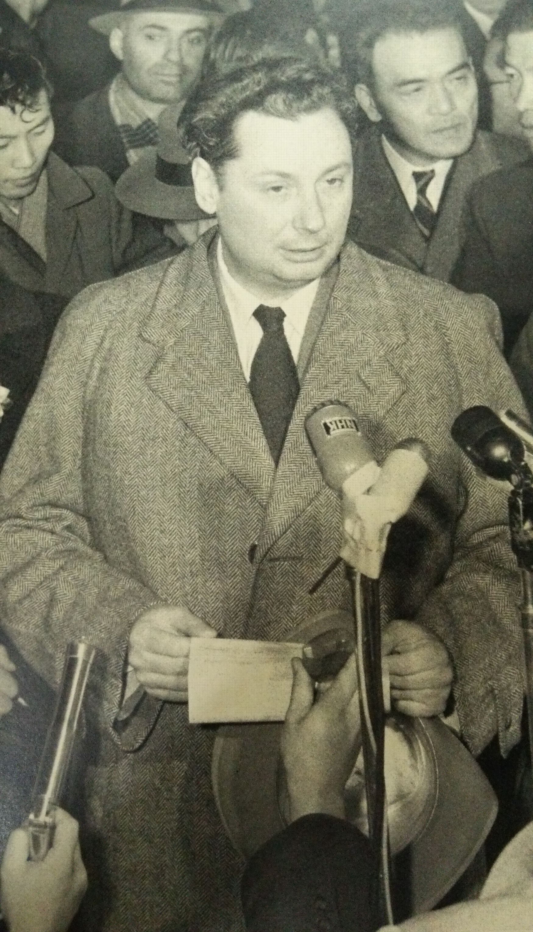 ニコライ・フェドレンコ